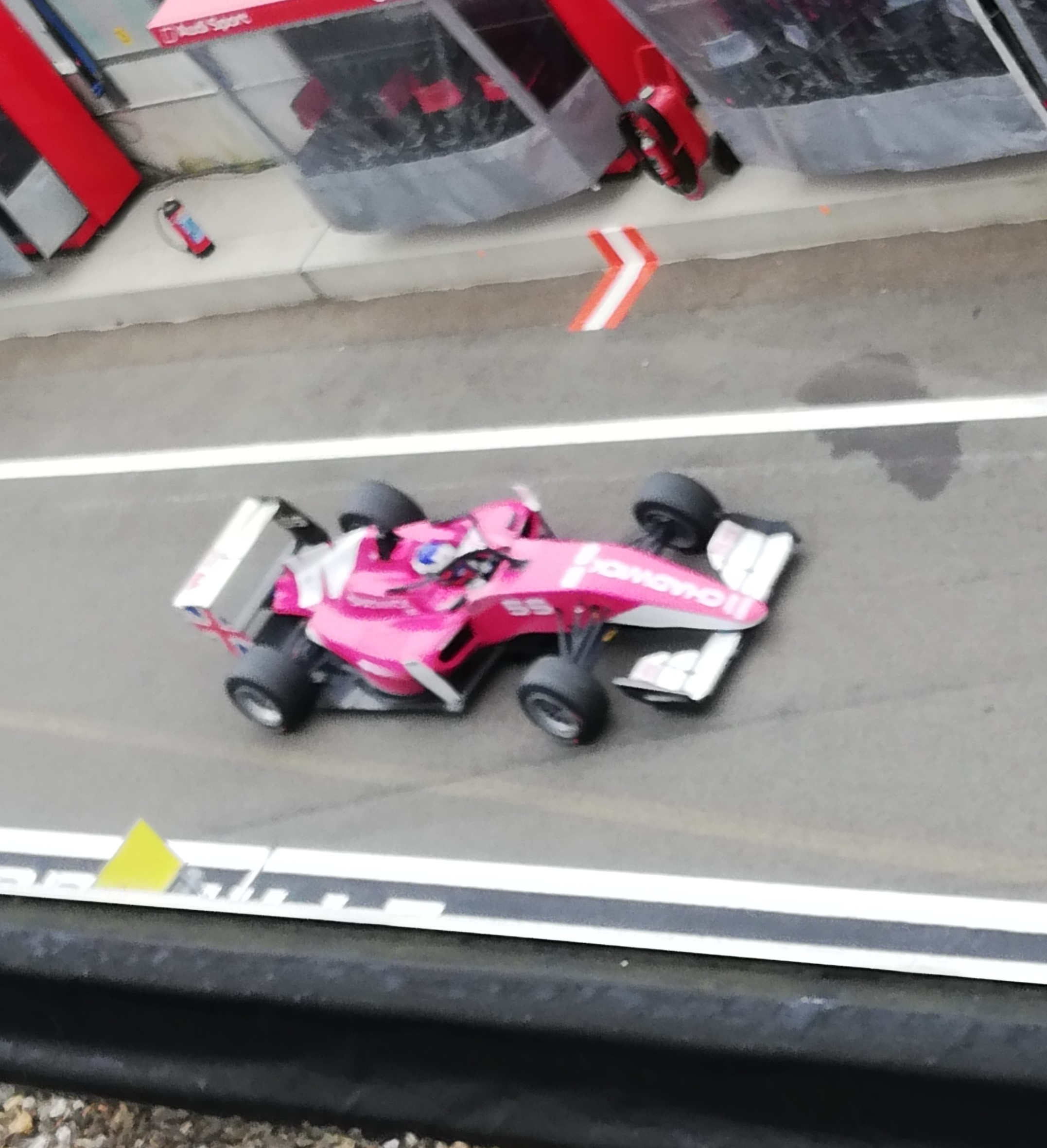 Jamie Chadwick a la sortie des stand, aux essais W Series au circuit de Zolder